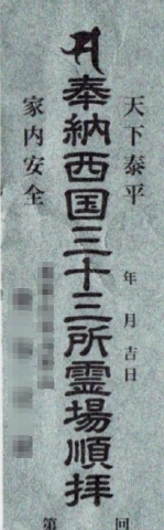 西国三十三所の銀札